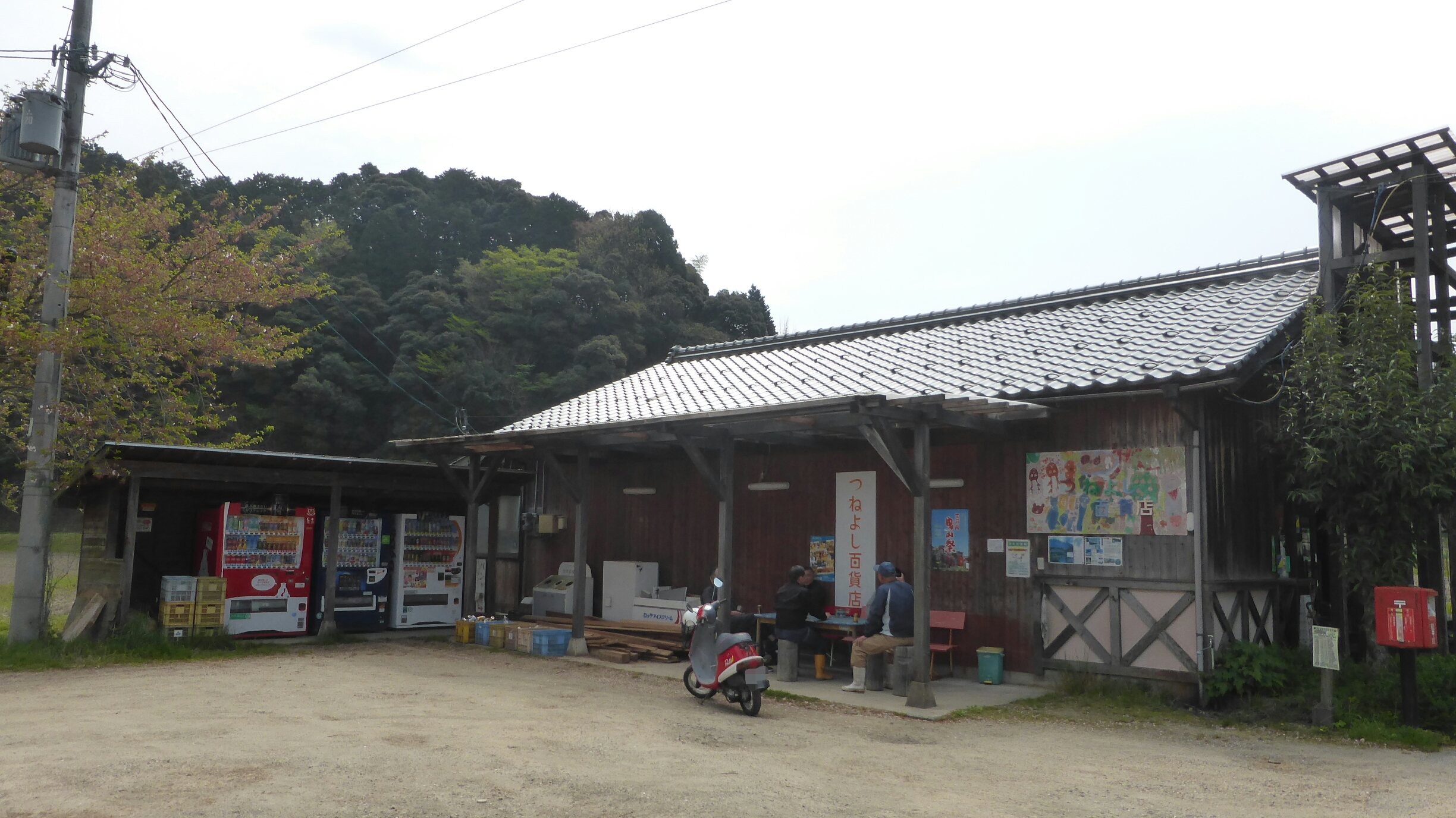 つねよし百貨店の外スペース。住民が集い雑談している。2019年4月21日撮影。